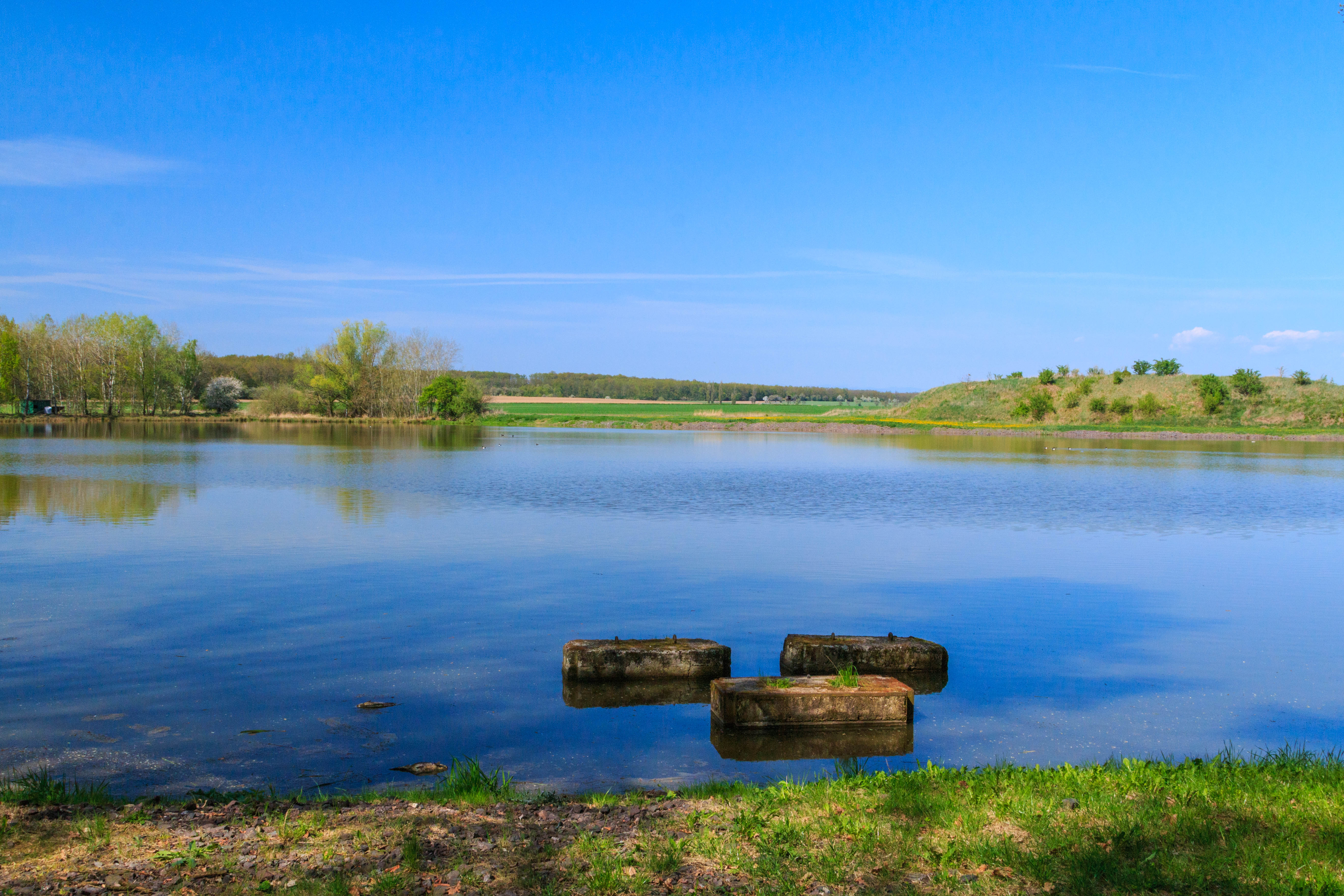 Rybník Králíček Project: Vodstvo.